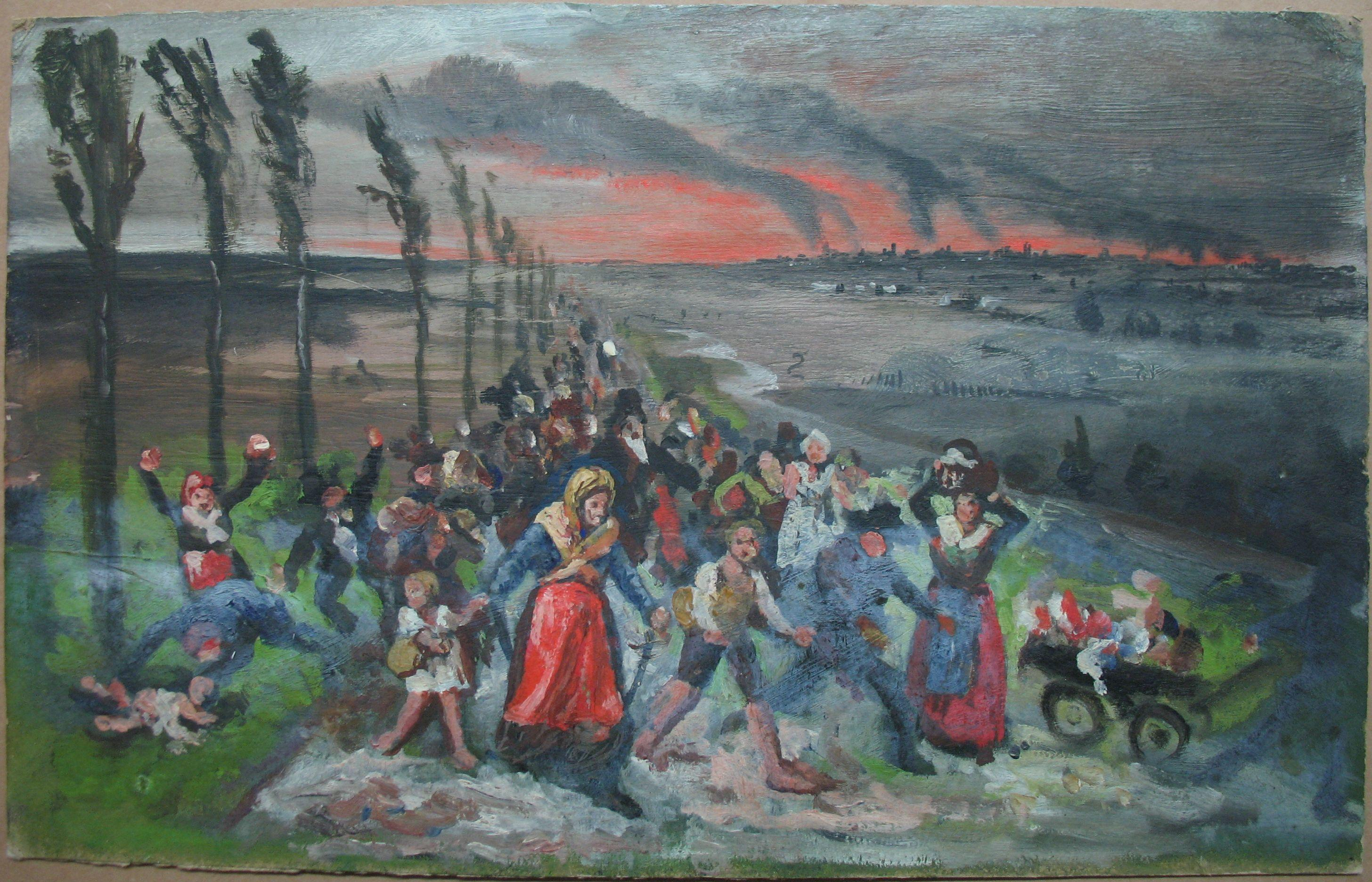 Flucht vor einem Stadtbrandtitle QS:P1476,de:"Flucht vor einem Stadtbrand" label QS:Lde,"Flucht vor einem Stadtbrand"